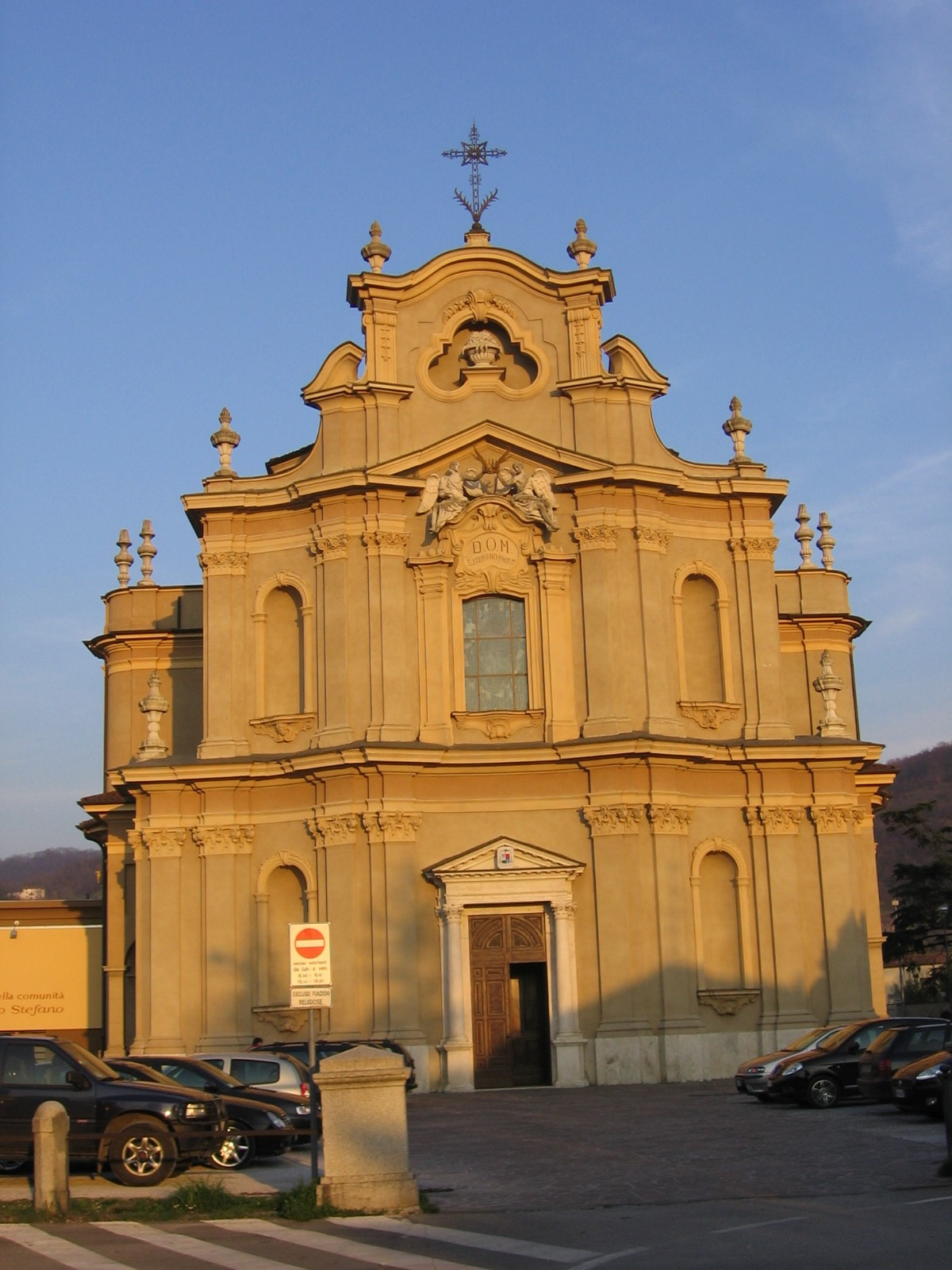 Villa di Serio, Bergamo, Italia